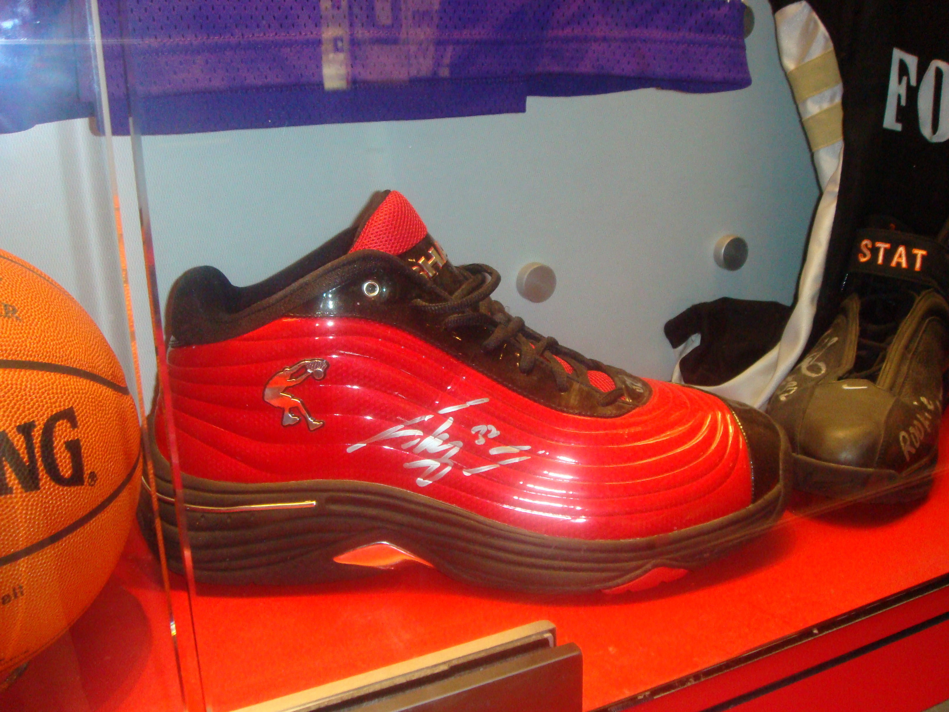 Basketballschuh v. Shaquille O'Neal